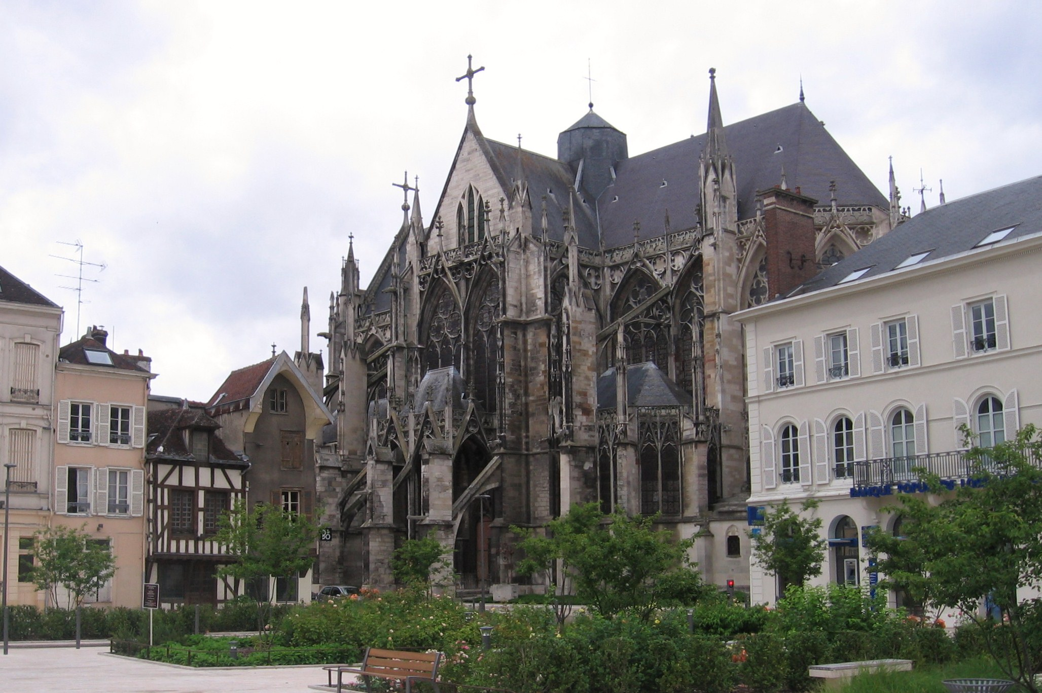 Exterieur de l'église